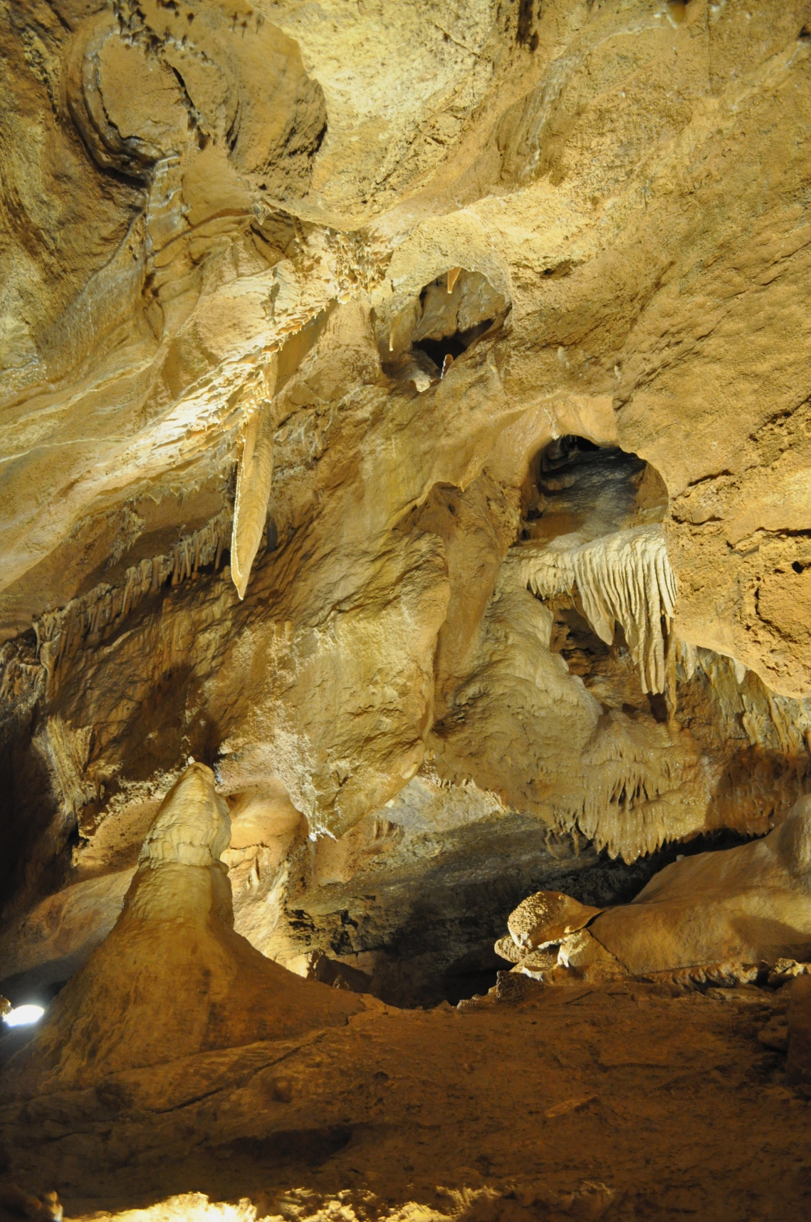 Nasvícená prohlídková trasa v Koněpruských jeskyních.